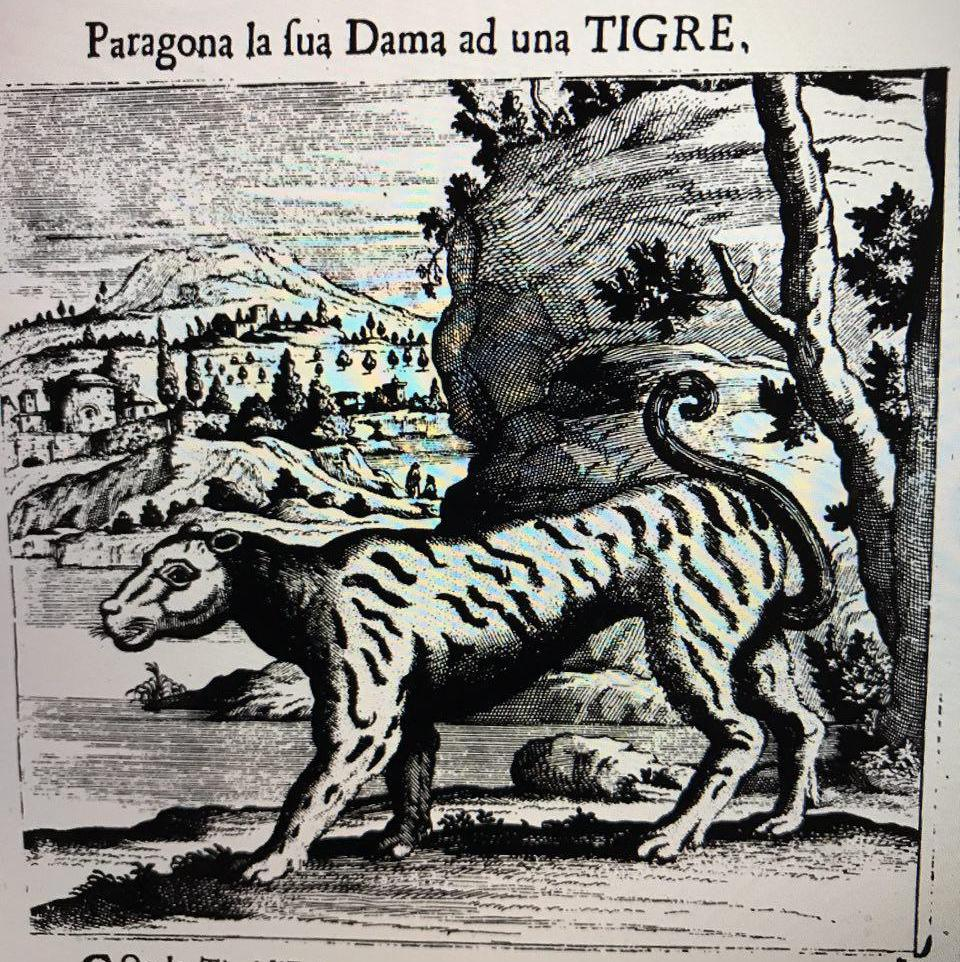 Логическая модель тигра. Иллюстрация из трактата "Opera: divisa in cinque libri ne'quali si tratta delle regole di Cavalcare, della professione di Spada, ed altri Esercici d'Armi... : con un Trattato del modo di curare l'infermità de'cavalli... : parimente con l'aggiunta d'alcune Rime, lettere e trattati di fisonomia, pittura, &c ; data in luce da Ettorre D'Alessandro..." Giuseppe D'Alessandro Antonio Muzio